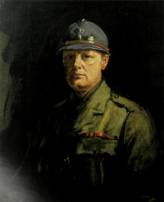 Холст, масло. Полотно находится в коллекции музея-усадьбы в Чартуэлле.